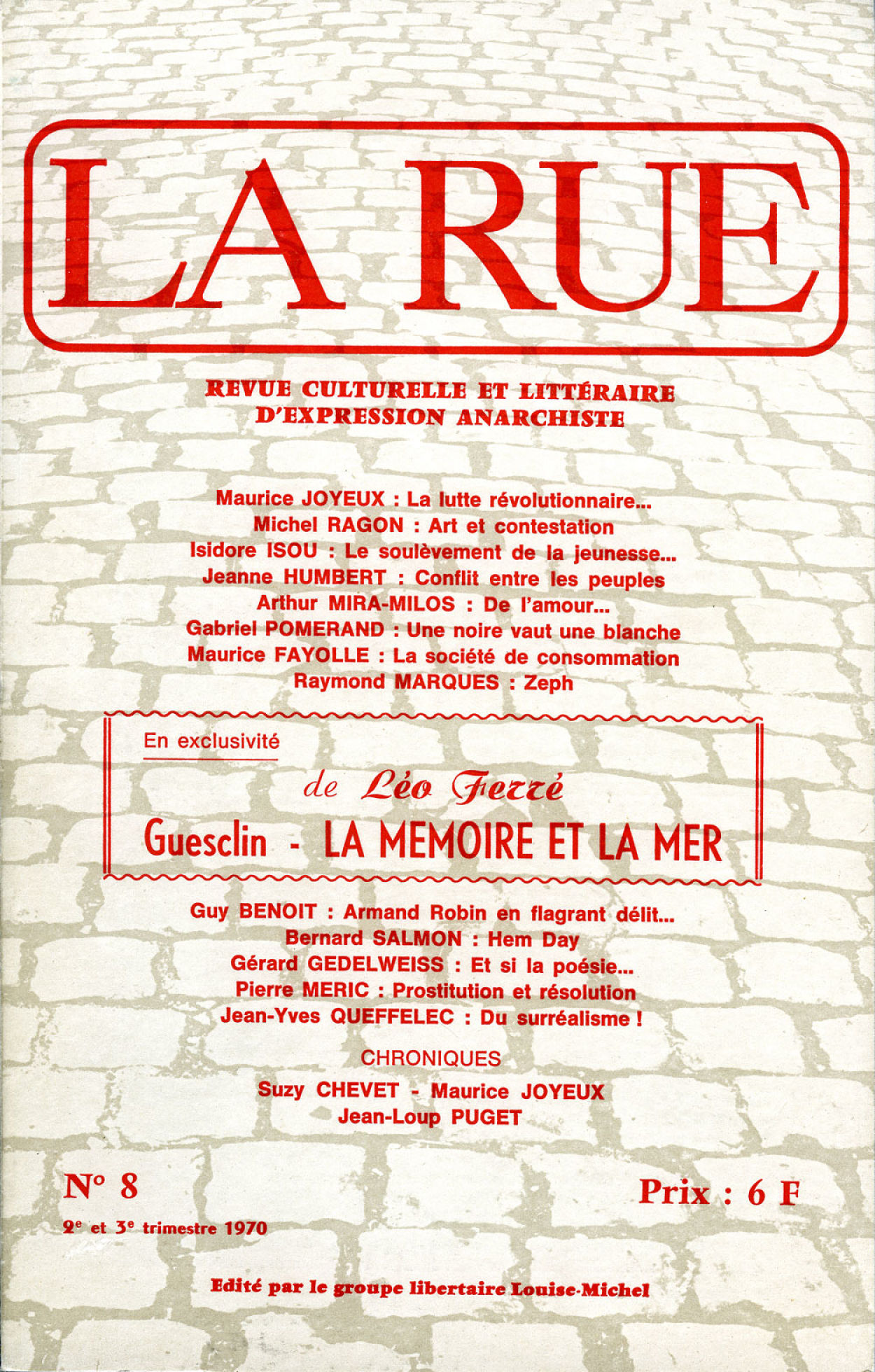 La Rue est une « revue culturelle et littéraire d’expression éditée par le groupe libertaire Louise Michel (Fédération anarchiste) - n°8 - 2e et 3e trimestre 1970.